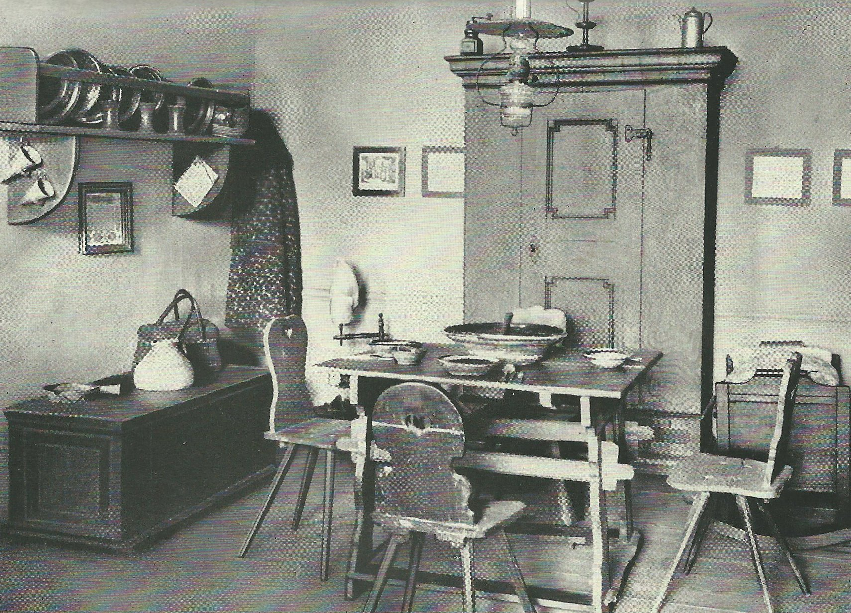 Bauernstube Schloßmuseum Zerbst, 1935 oder früher Das Bild wurde 1935 im Buch von Eduard Stegmann, Aus dem Volks- und Brauchtum Magdeburgs und der Börde, Magdeburger Kultur- und Wirtschaftsleben Nr. 4, Herausgegeben von der Stadt Magdeburg, Seite 39